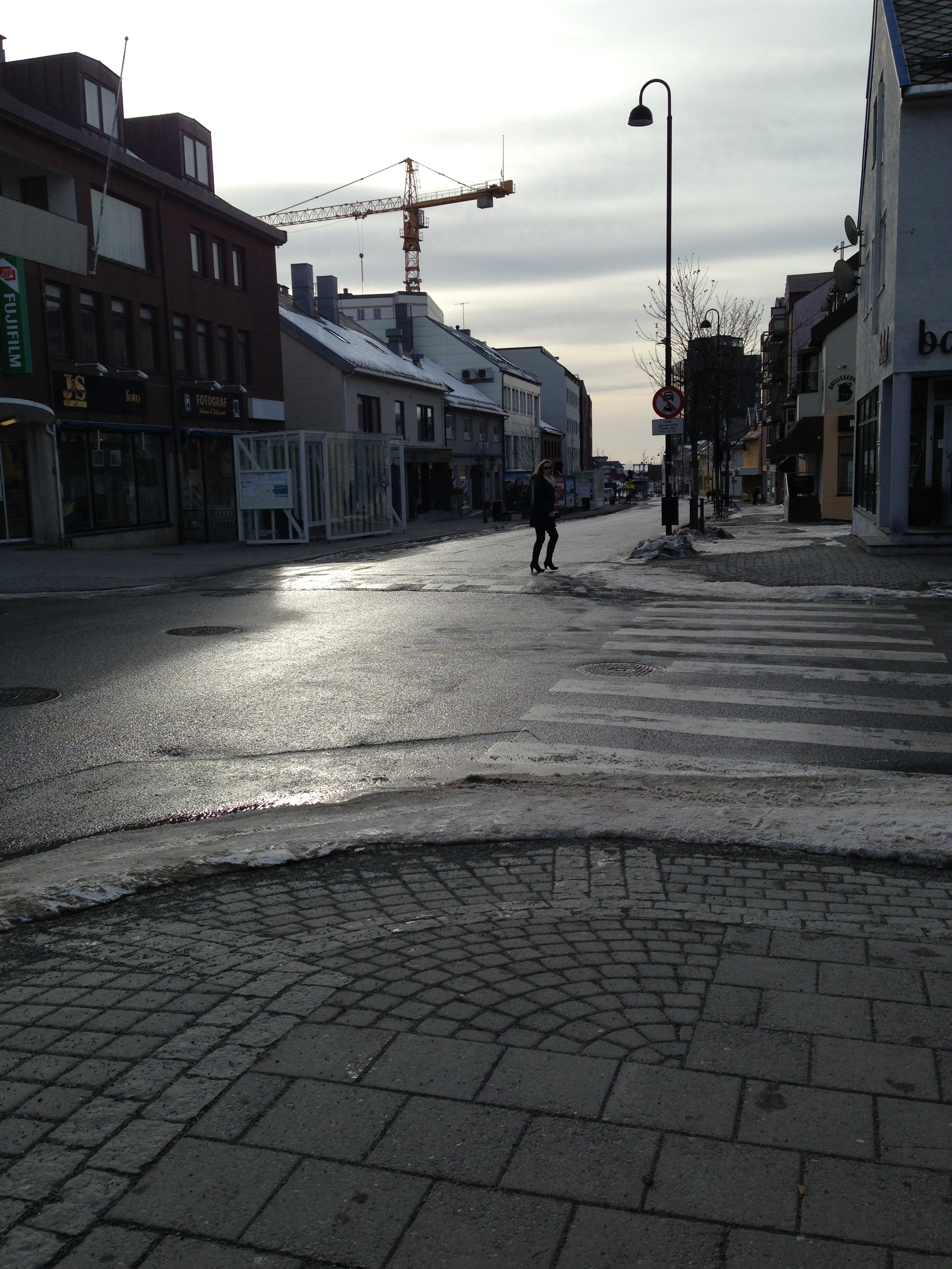 Dronningens gate i Bodø, sett ved krysset til Torvgata.